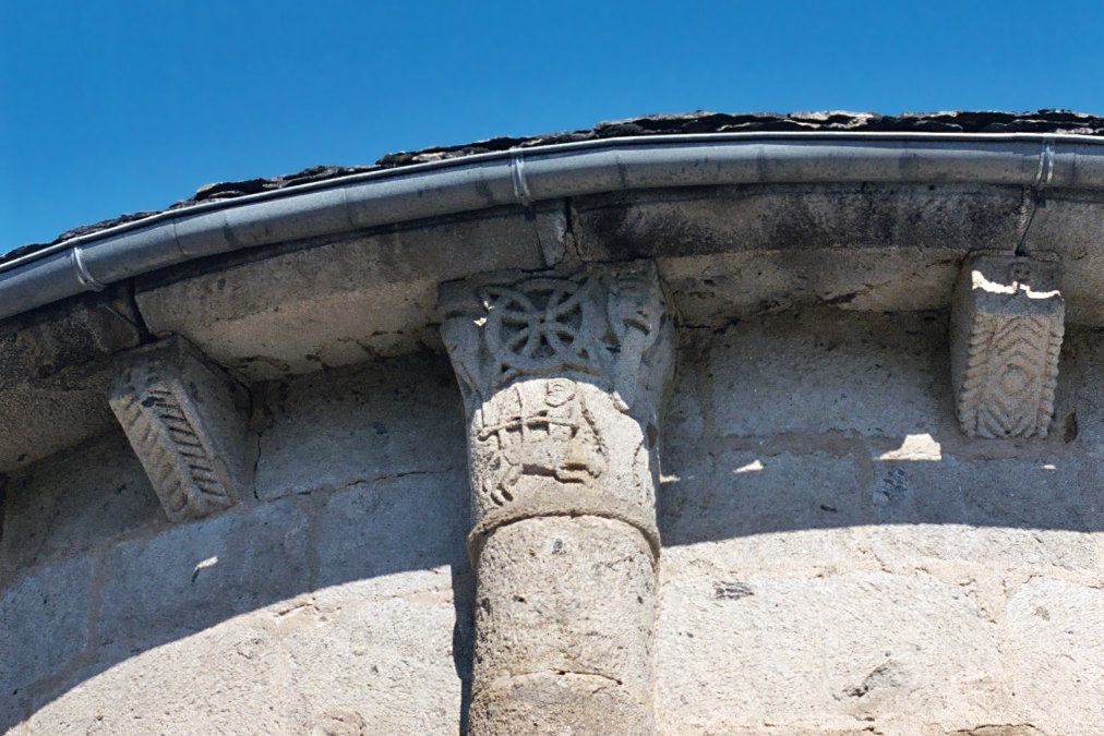 France - Auvergne - Cantal - Église de Saint-Étienne-de-Chomeil